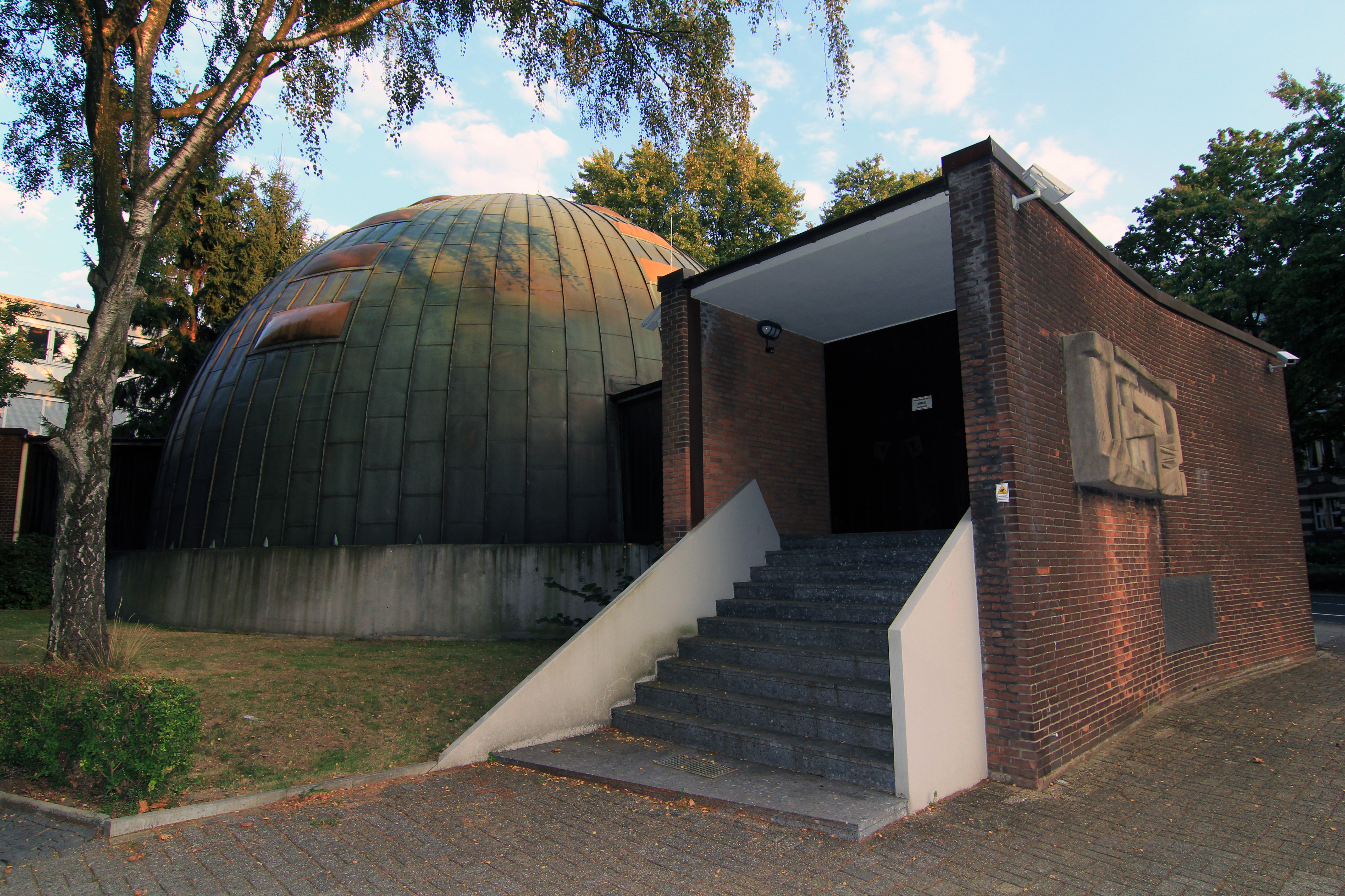 Neue Synagoge von Essen (1959) mit Gemeindezentrum, Sedanstr. 46, Essen-Südostviertel, 2016 This image shows a heritage building in Germany, located in the North Rhine-Westphalian city Essen (no. 908).